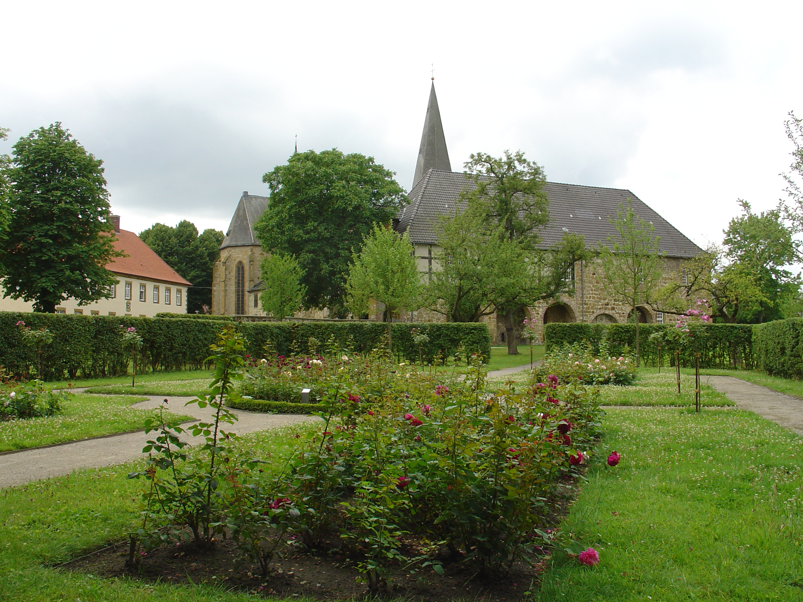 Klostergarten des Benediktinerinnenklosters Herzebrock